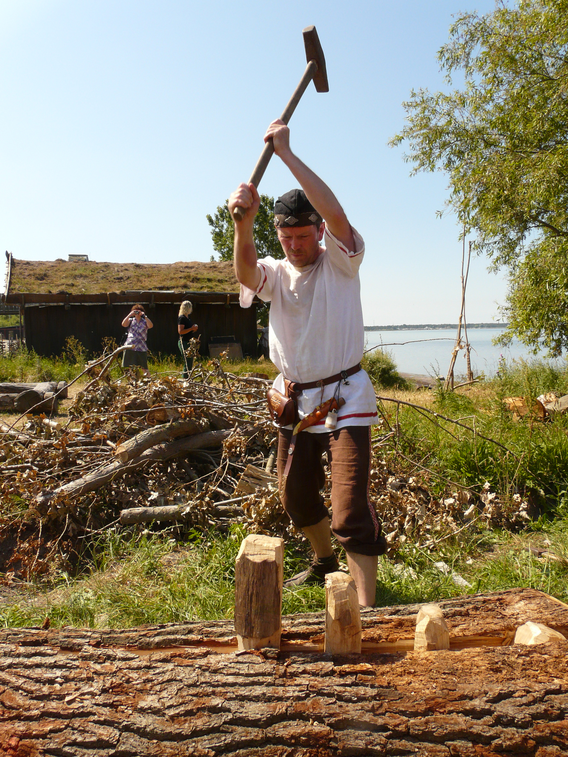 Spalten einer Eiche nach wikingerzeitlicher Methode im Museum Foteviken.